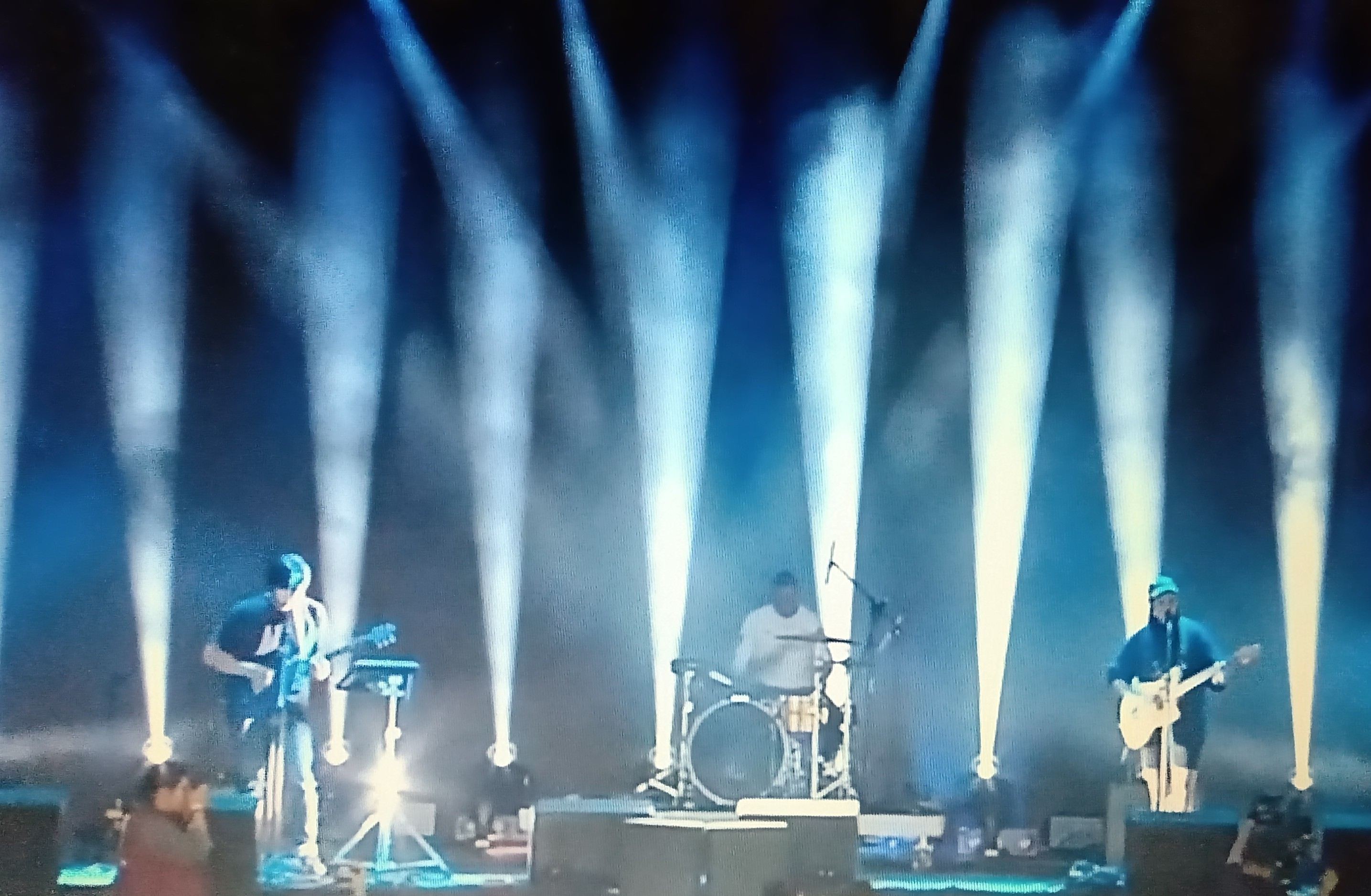 Sales performing at Mexico City, 2019